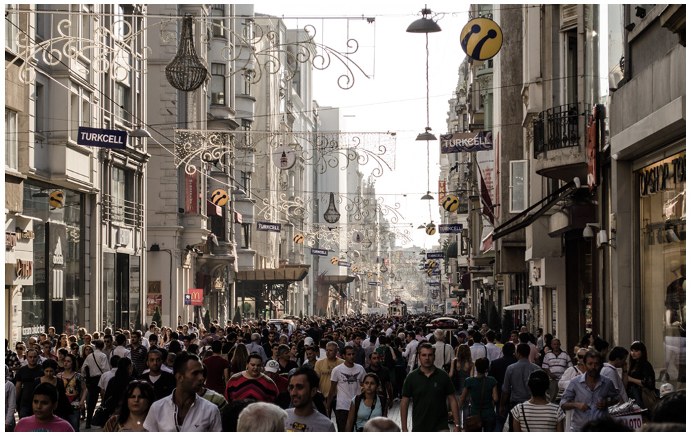 Istiklal Avenue, Istanbul